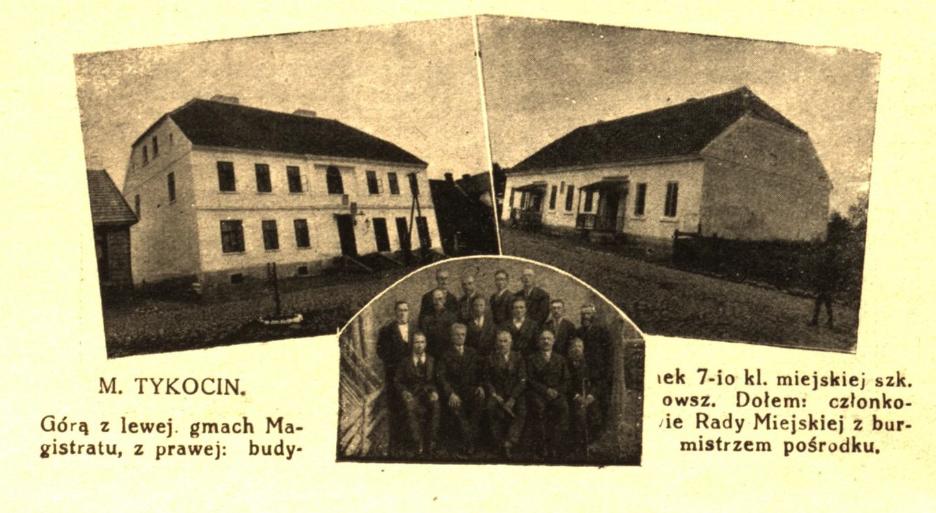 M. Tykocin.